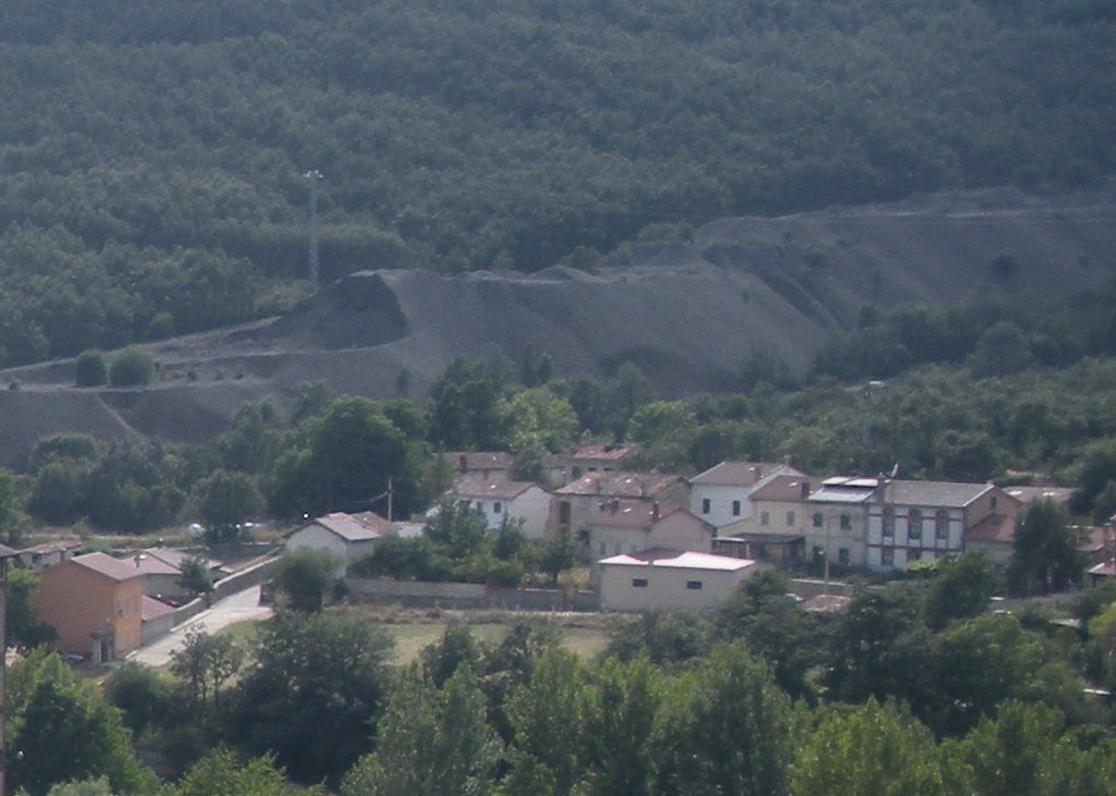 Escombreras en la localidad de Barruelo de Santullán, en Palencia.